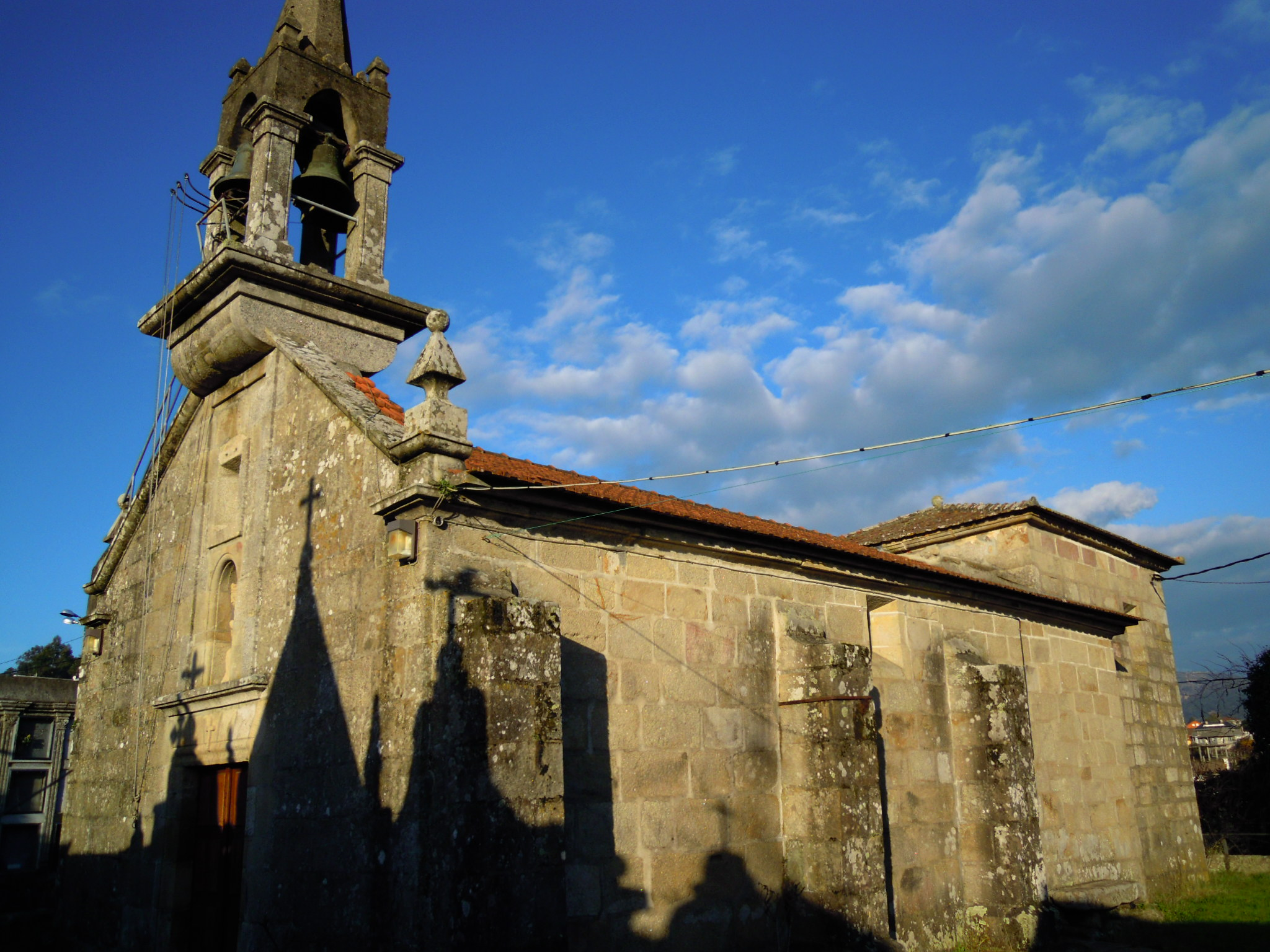 Igrexa parroquial de Sanguiñeda (Mos)